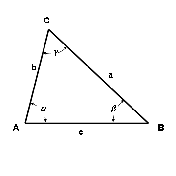 Driehoek - eigen werk - publiek domein